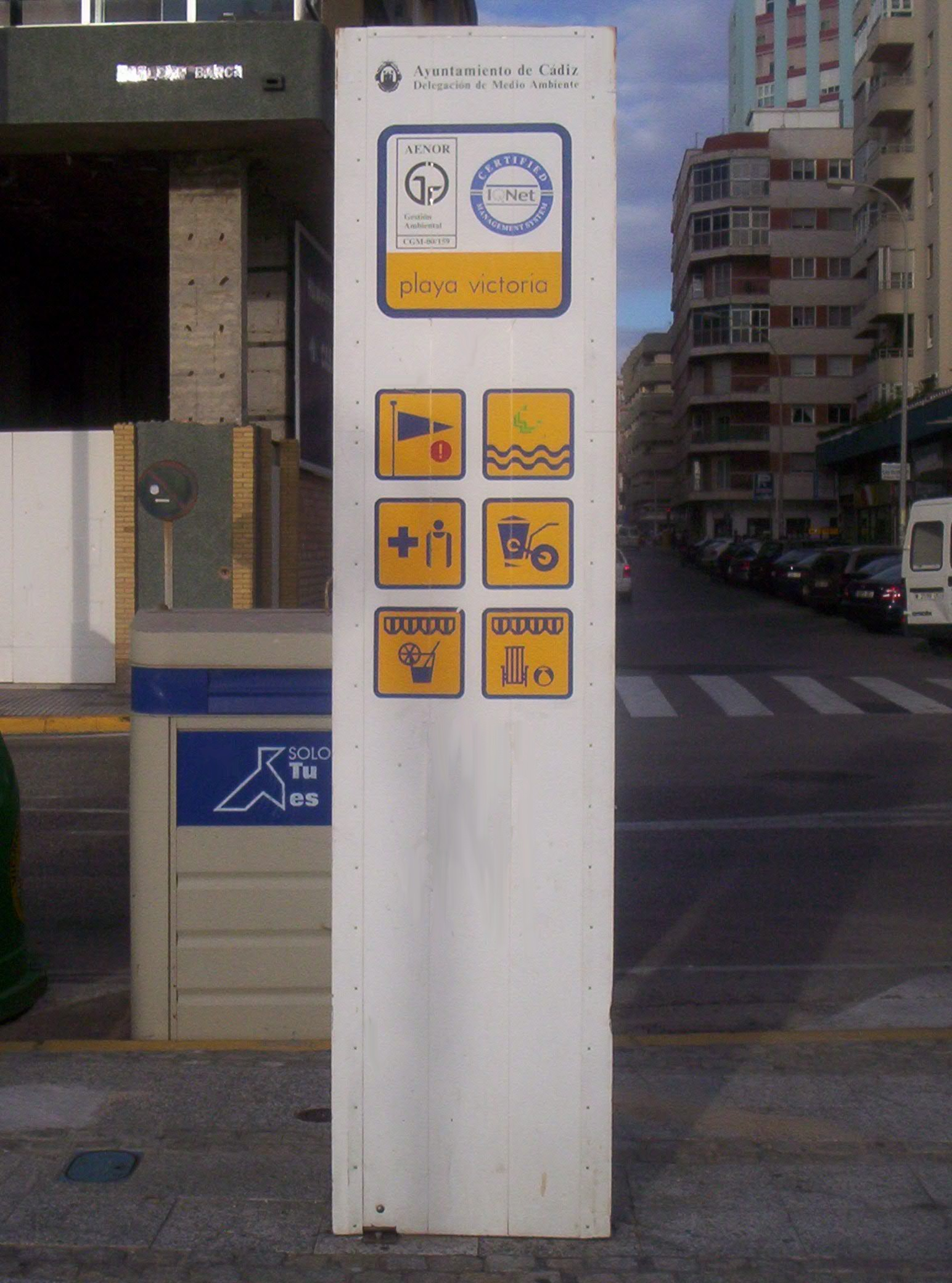 Foto de una señal de la playa Victoria (Cádiz, España) en que aparece el certificado de calidad AENOR y algunos de los servicios que ofrece mediante iconos.